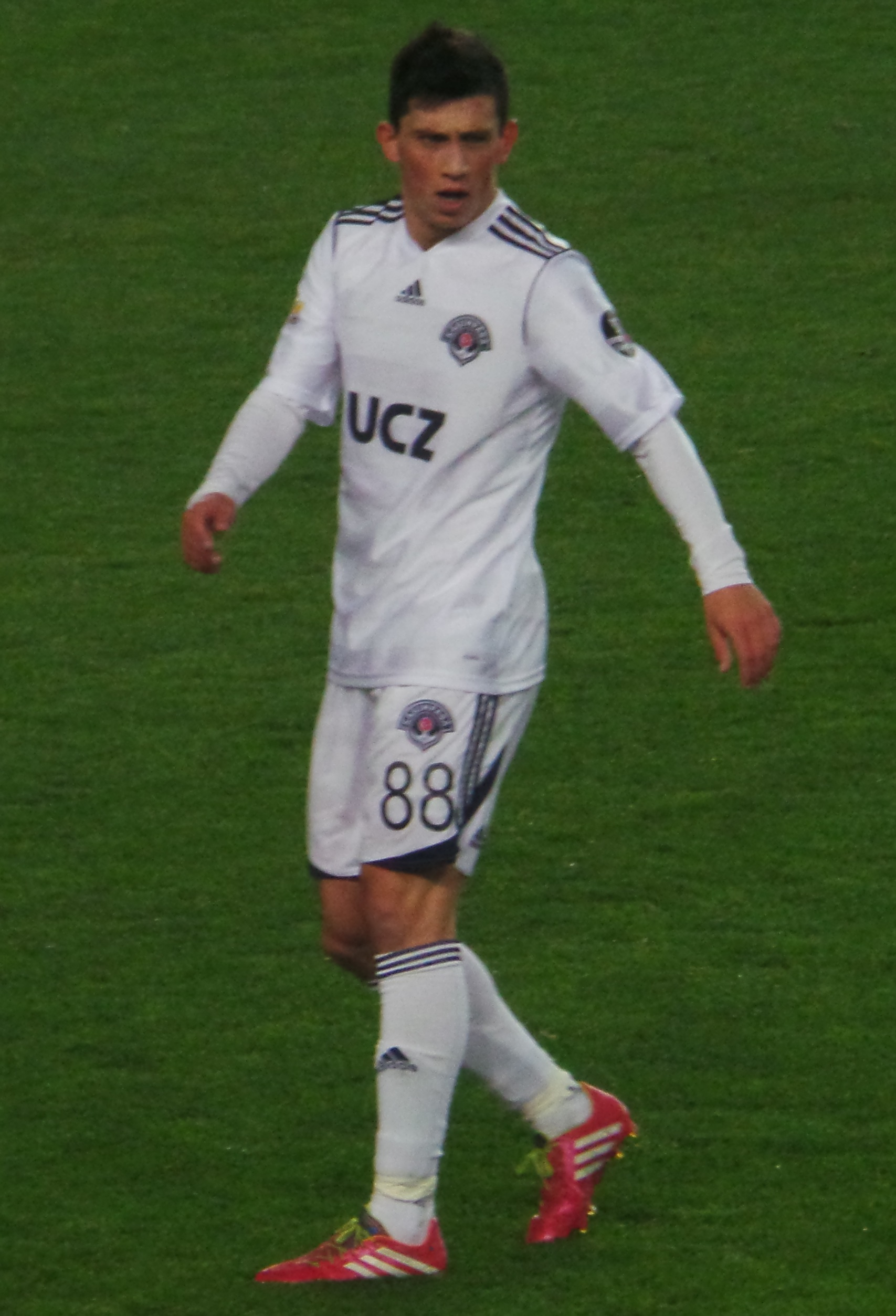 André Castro vs Fenerbahçe 2-1